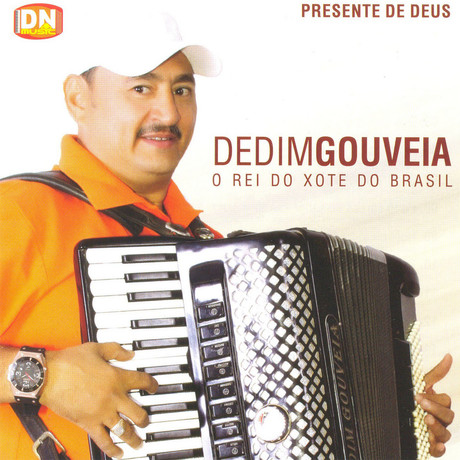 Dedim Gouveia o Rei Do Xote Do Brasil